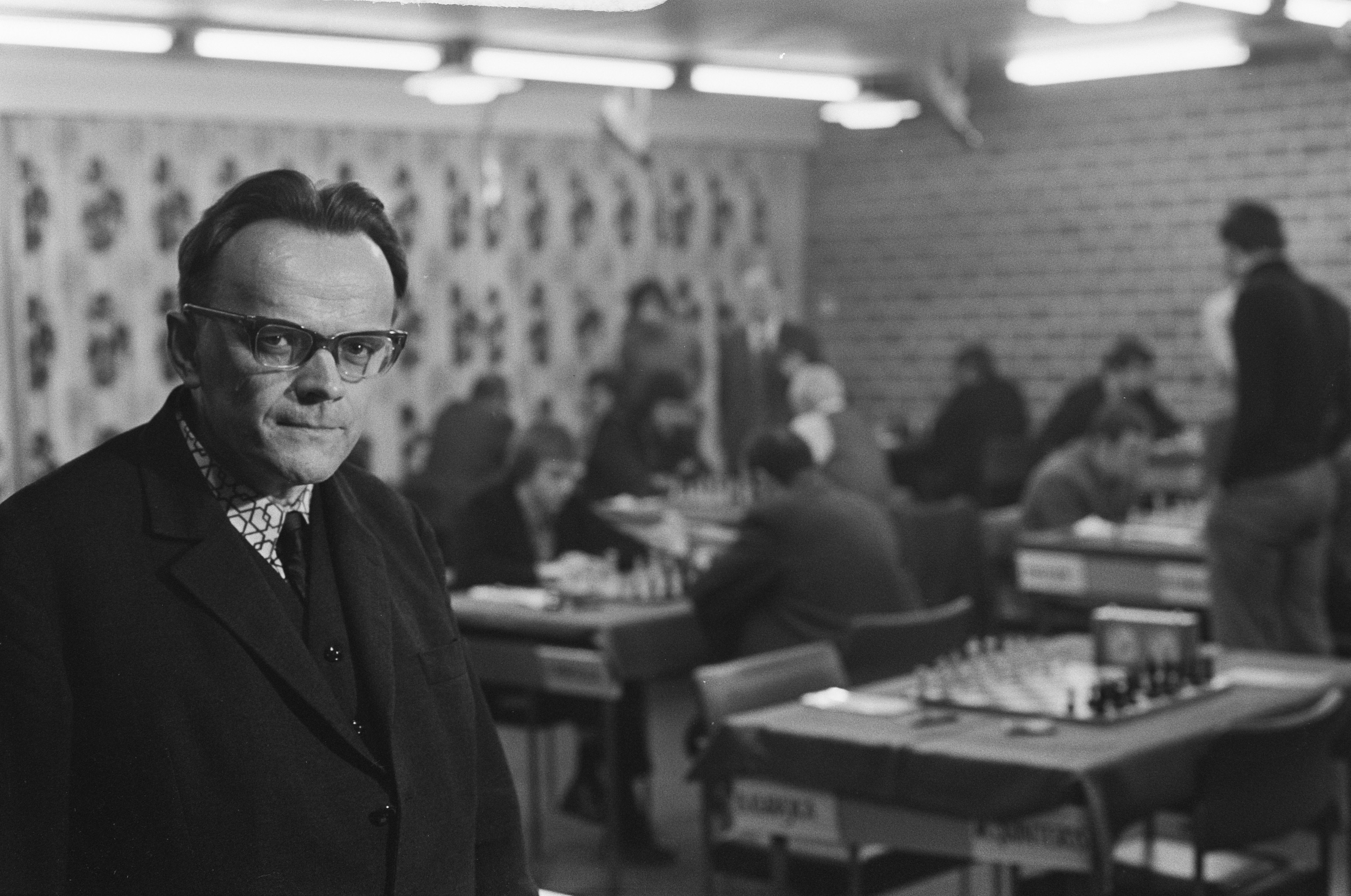 Collectie / Archief : Fotocollectie Anefo Reportage / Serie : [ onbekend ] Beschrijving : Hoogovens-schaaktoernooi te Wijk aan Zee , eerste ronde, Pachman Datum : 16 januari 1973 Locatie : Noord-Holland, Wijk aan Zee Trefwoorden : schaken Instellingsnaam : Hoogovenschaaktoernooi Fotograaf : Mieremet, Rob / Anefo Auteursrechthebbende : Nationaal Archief Materiaalsoort : Negatief (zwart/wit) Nummer archiefinventaris : bekijk toegang 2.24.01.05 Bestanddeelnummer : 926-1583